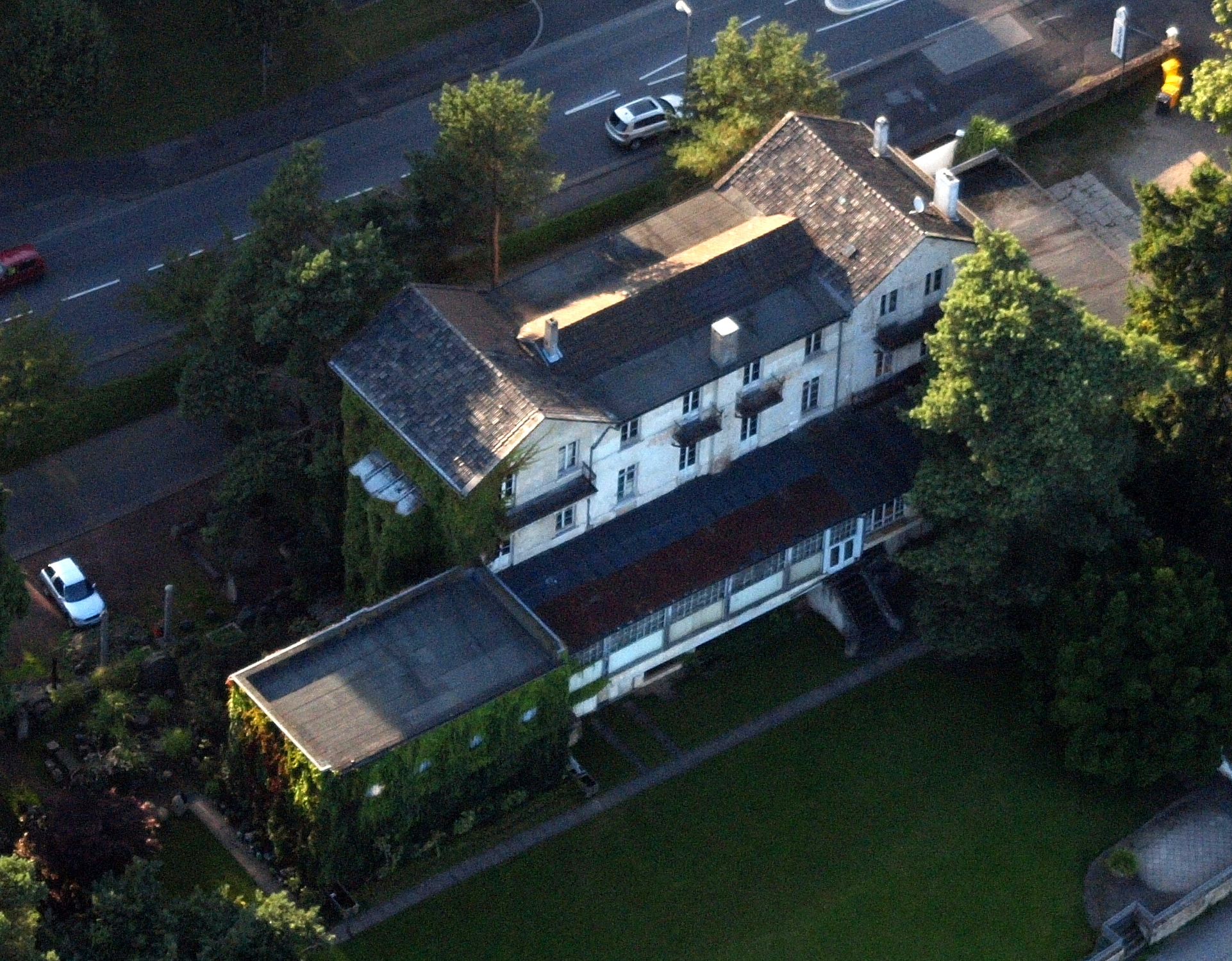 Ehemaliges Hotel Billau, Bonner Straße 66–68, Remagen-Rolandseck: Luftaufnahme; oben die Bonner Straße (Bundesstraße 9)